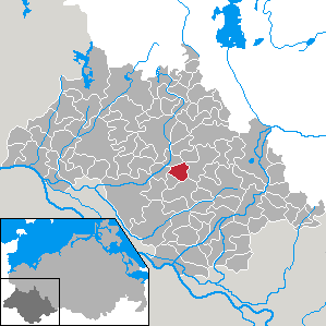 Bresegard bei Picher in Mecklenburg-Vorpommern - district Ludwigslust